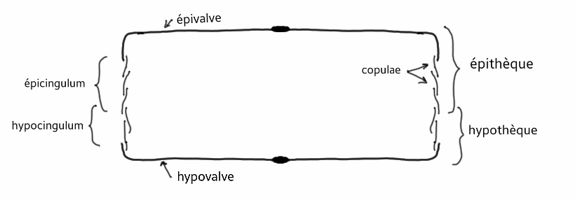 Structure générique d'un frustule de diatomée